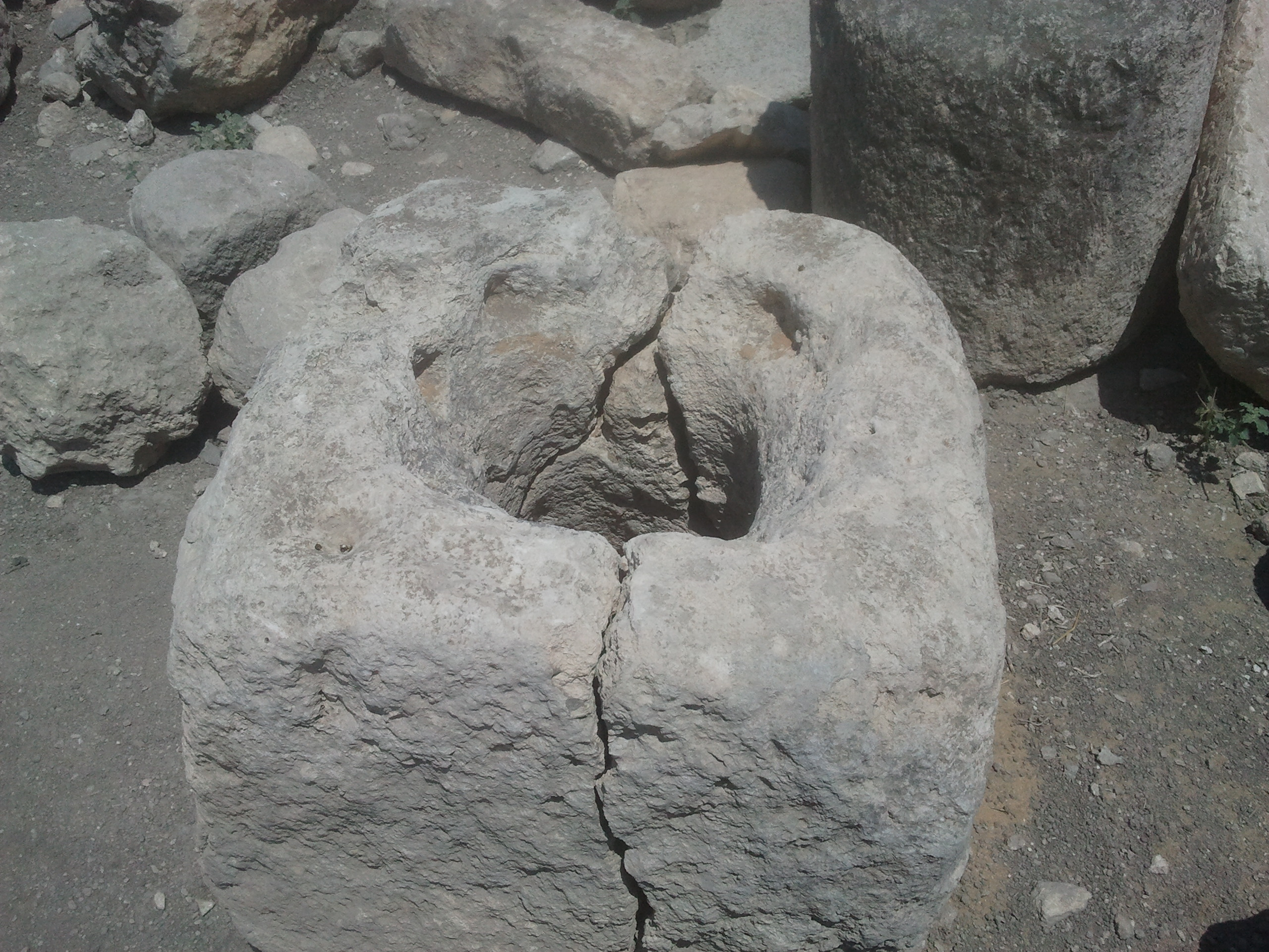 שרידי היישוב היהודי העתיק חוקוק שהיה כפר יהודי בימי המשנה והתלמוד. על שליש משטחו שכן לאחר מכן הכפר הערבי יאקוק אבן חצובה שכיסתה בור מים פעמוני ובמרכזה חצוב פתח לשאיבת מי הבור ומגרעת להנחת מכסה הבור